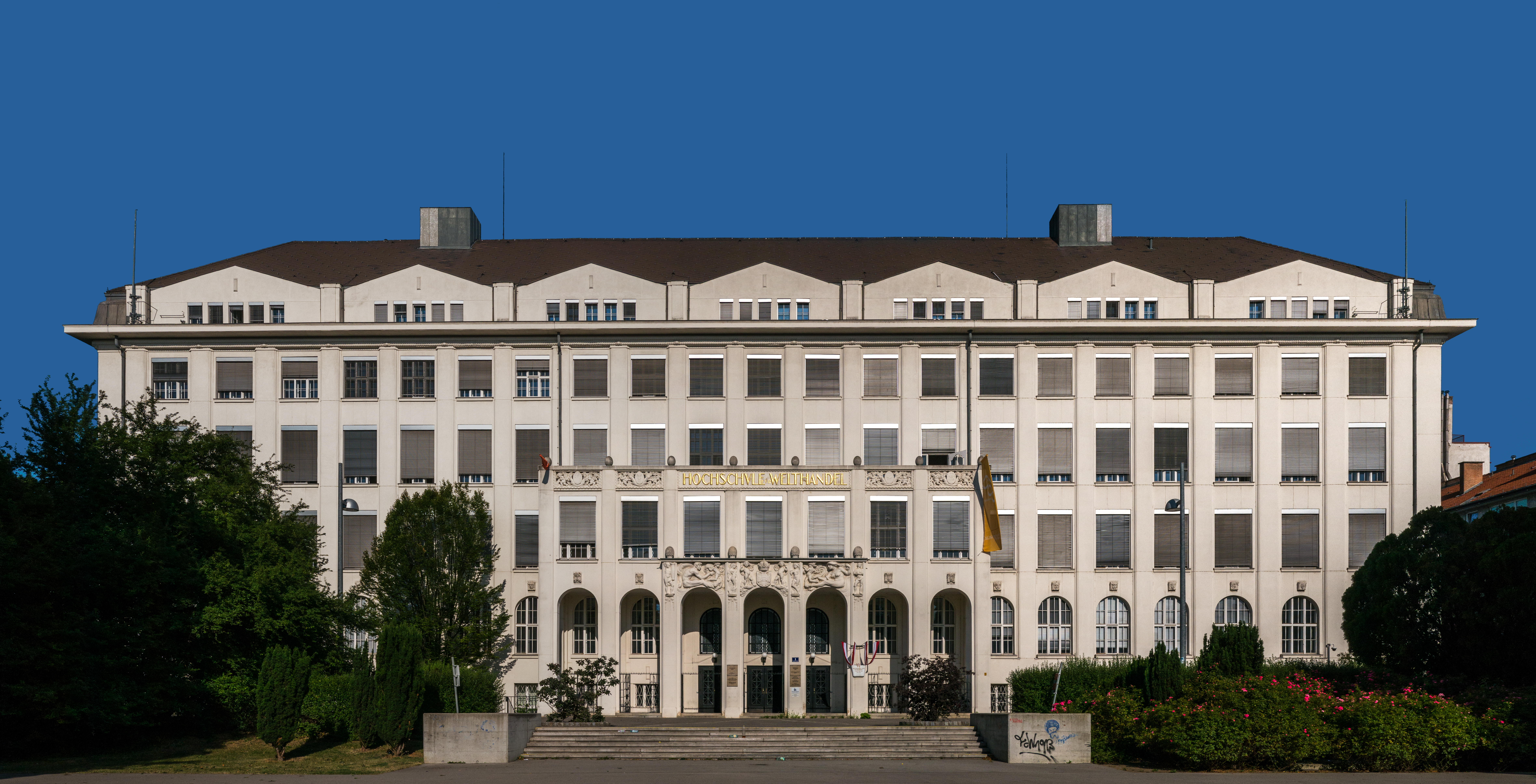 Ehem. Hochschule für Welthandel; Franz-Klein-Gasse 1